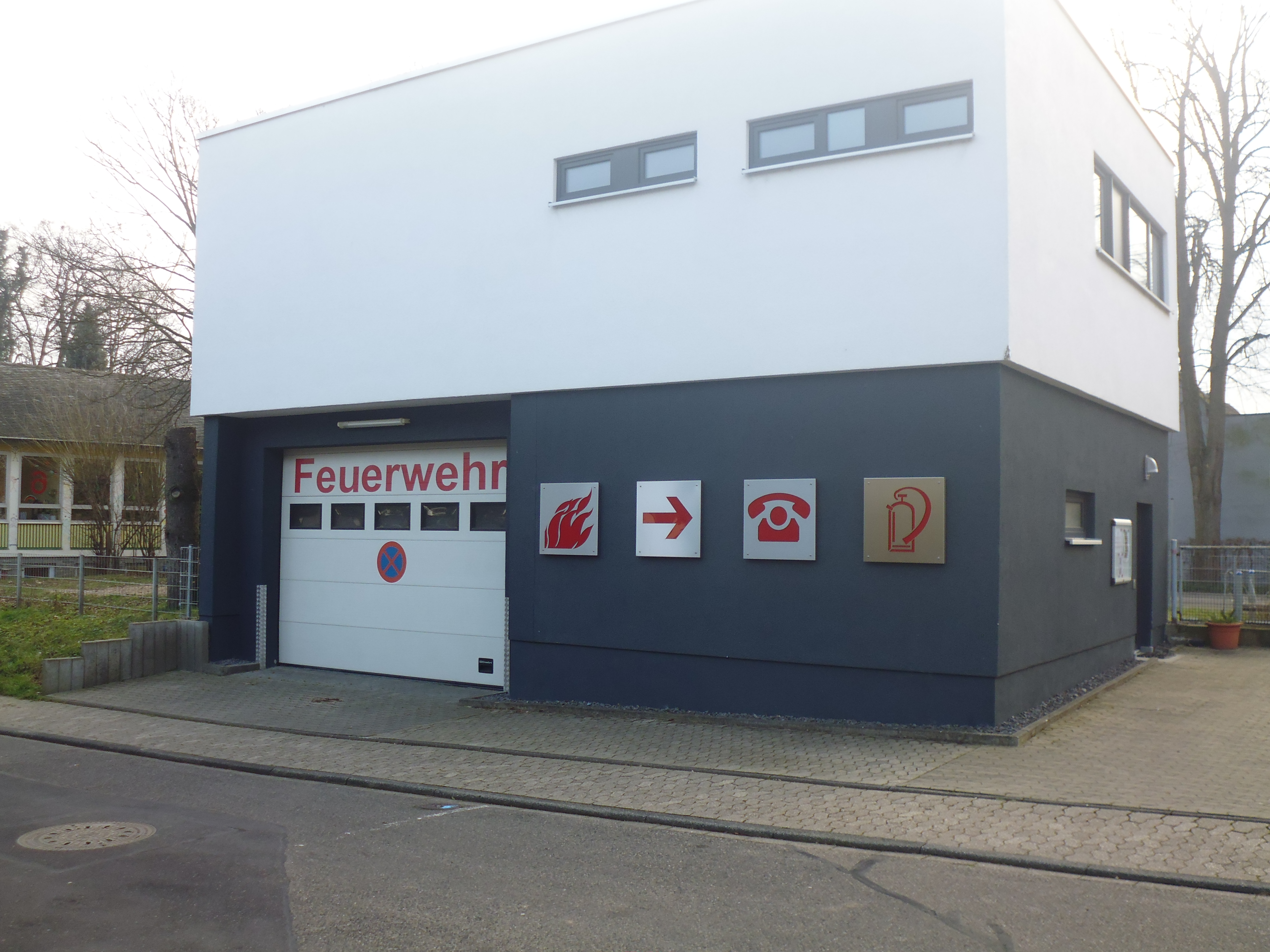 Gerätehaus der FF Koblenz-Bubenheim